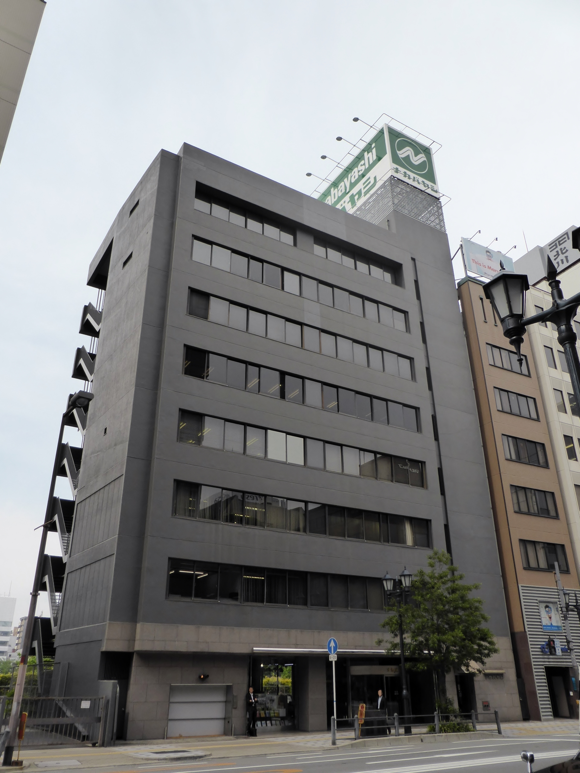 ナカバヤシ株式会社本社を撮影。